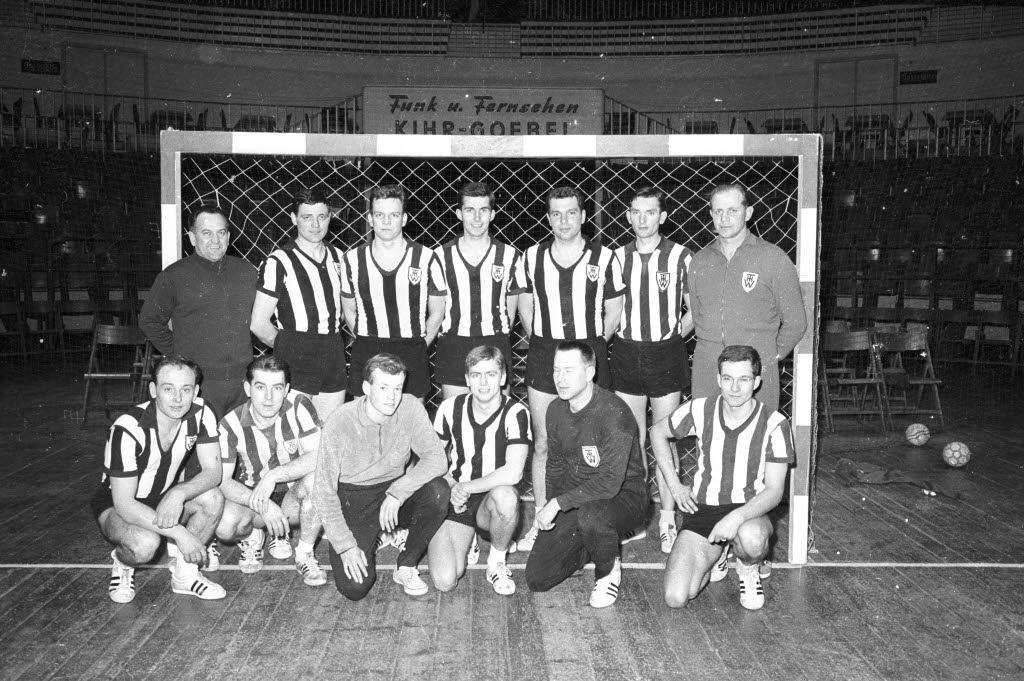 in der Ostseehalle nach dem Aufstieg in die Handball-Bundesliga in der Saison 1966/1967. Im Bild in der hinteren Reihe v.l.n.r.: Betreuer Rolf Krabbenhöft, Peter Prehn, Bernd Struck, Georg Wegner, Günter Wriedt, Karl-Heinz Röhe, Trainer Heinrich Dahlinger, sowie in der vorderen Reihe v.l.n.r.: Reinhard Kroeske, Peter Werk, Heiko Knutzen, Herwig Ahrendsen, Ulli Knop, Werner Pruscha.